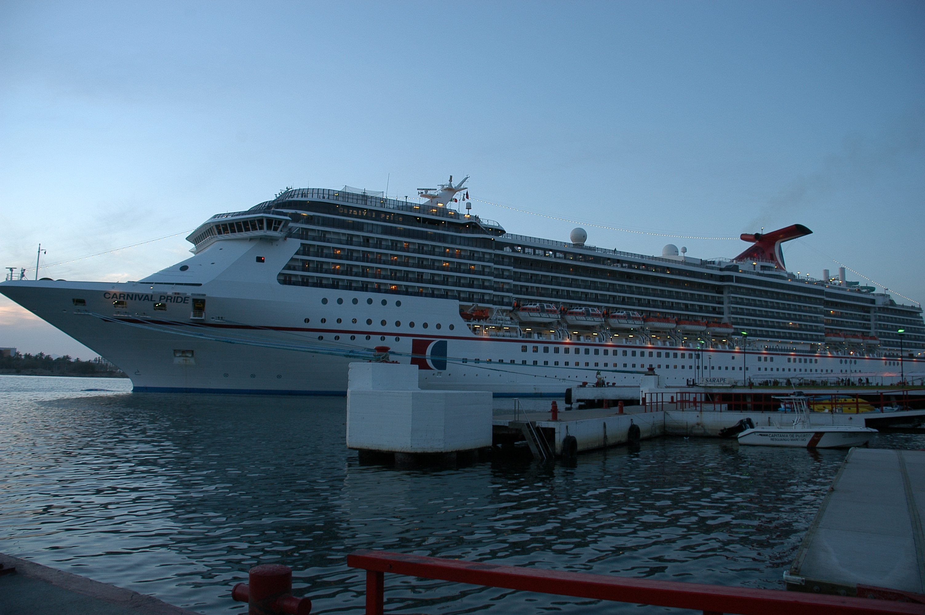 Carnival Pride docked in Puerto Vallarta, Mexico